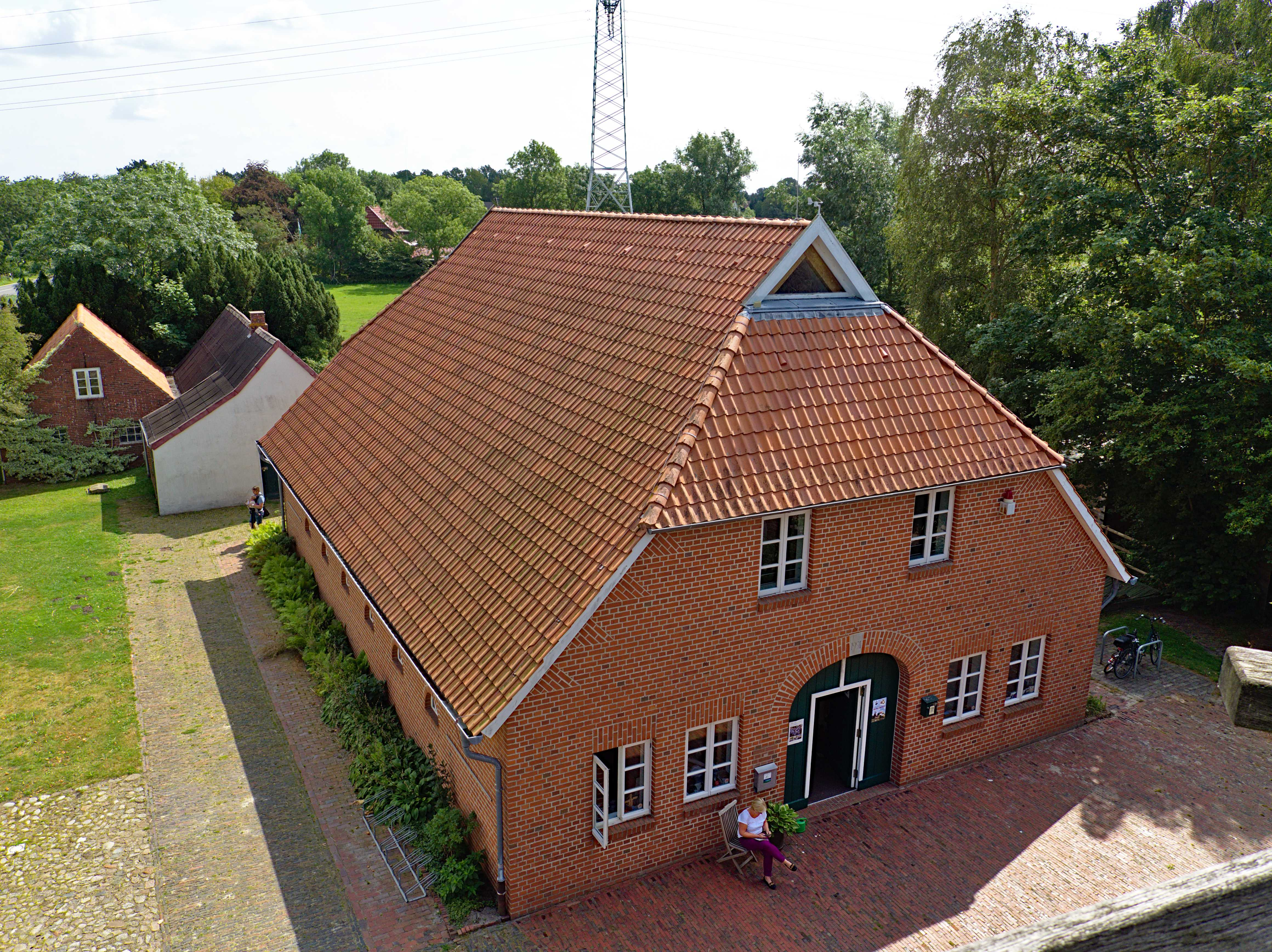 Das Museumsgebäude des Museums Moorseer Mühle in Nordenham-Abbehausen.